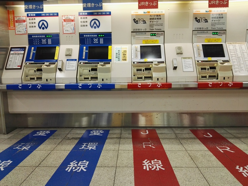 Kozoji station ticket vending machines